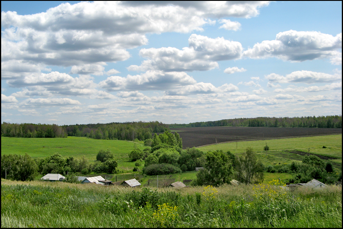 Серый Ключ